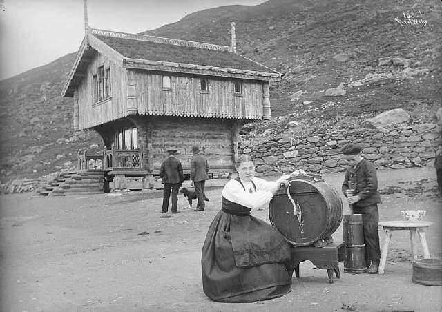 Smørkinning på Haukeliseter i Vinje